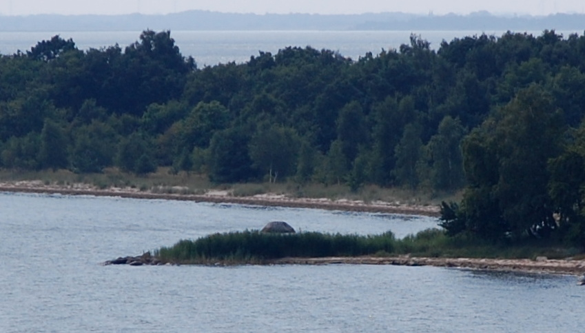 Vilm Waschstein Blick von Norden